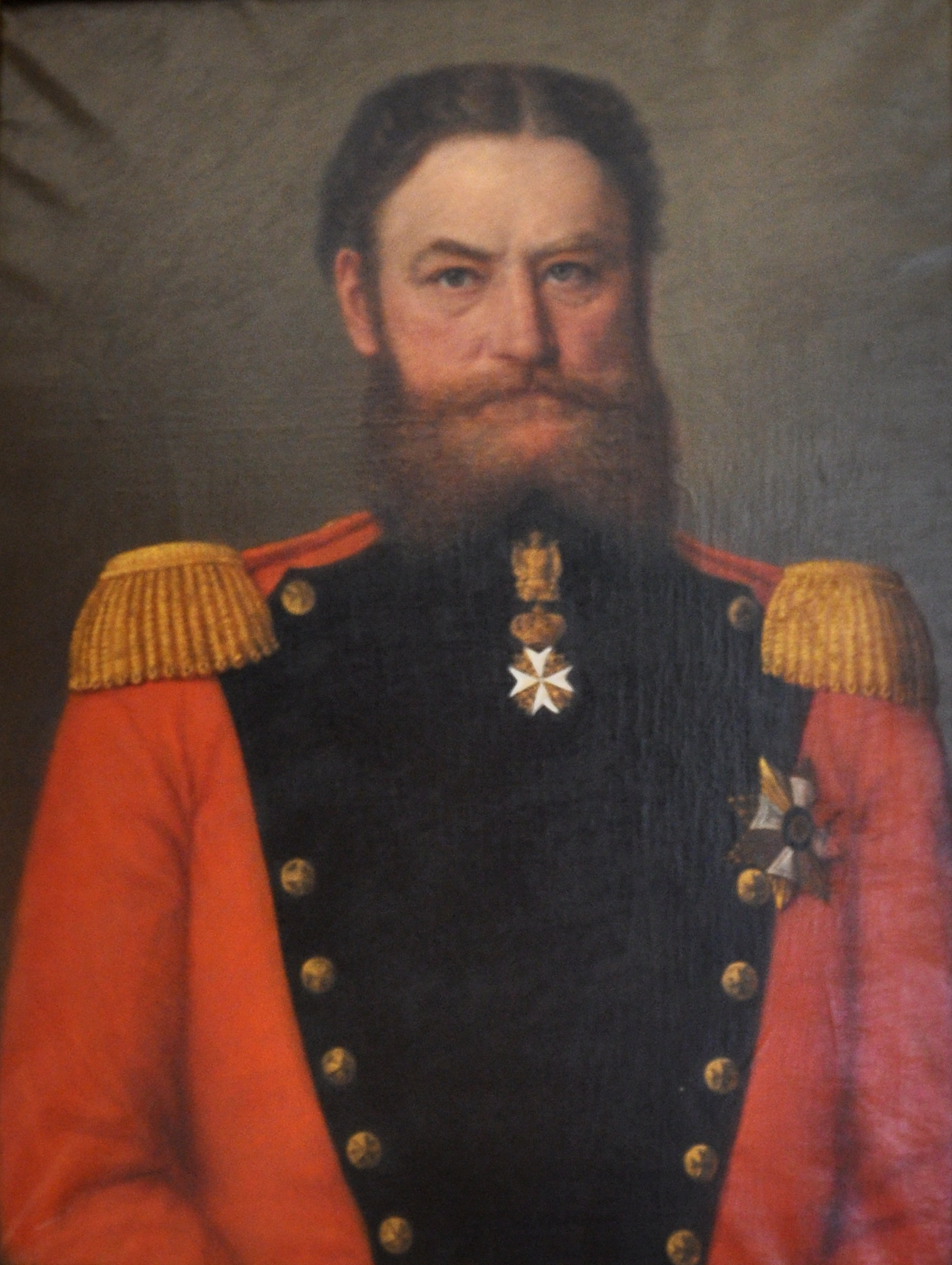 Burg Waldburg (Württemberg), Porträt Franz Xaver Fürst von Waldburg-Wolfegg und Waldsee (1833–1906)